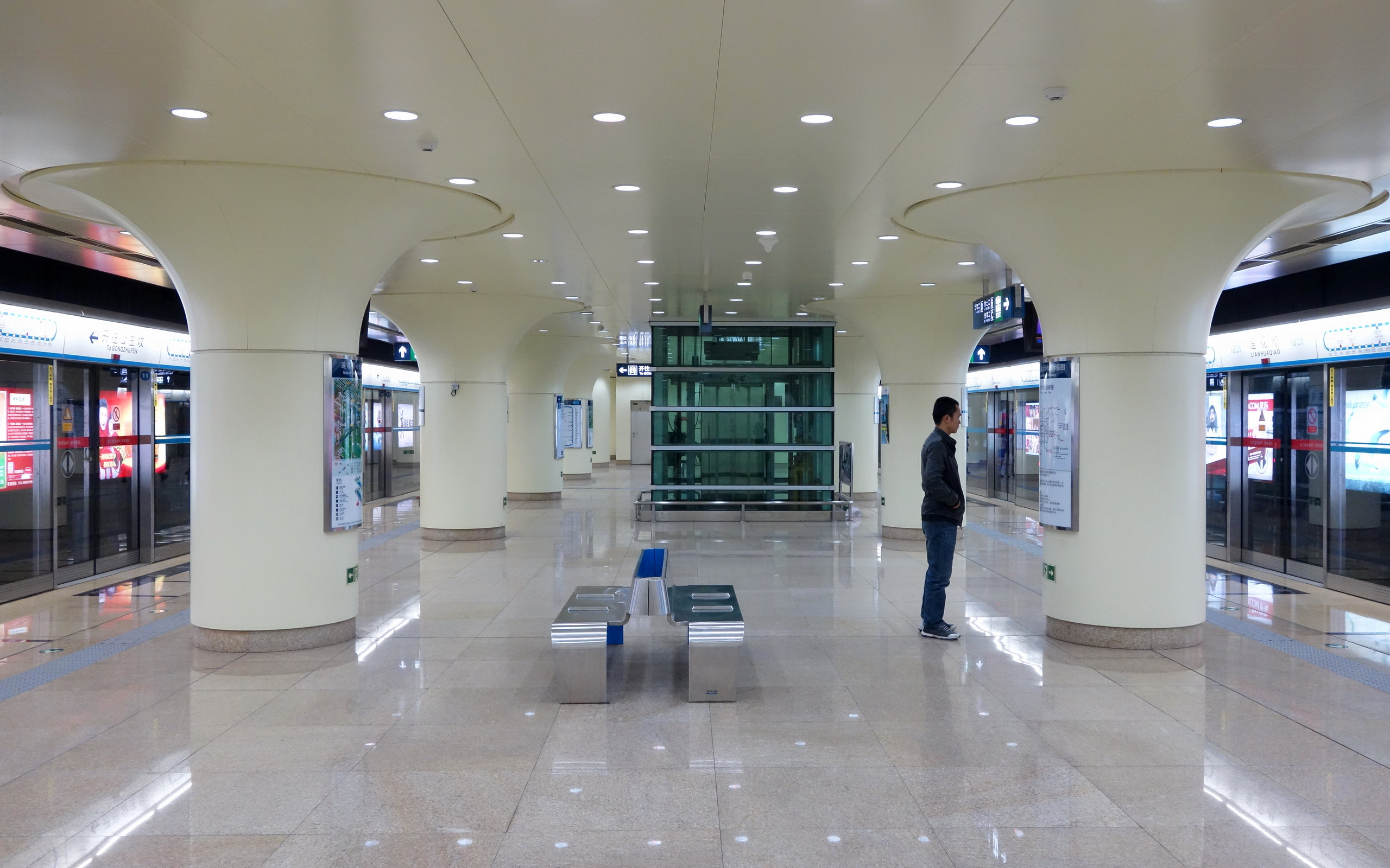 北京地铁10号线莲花桥站站台